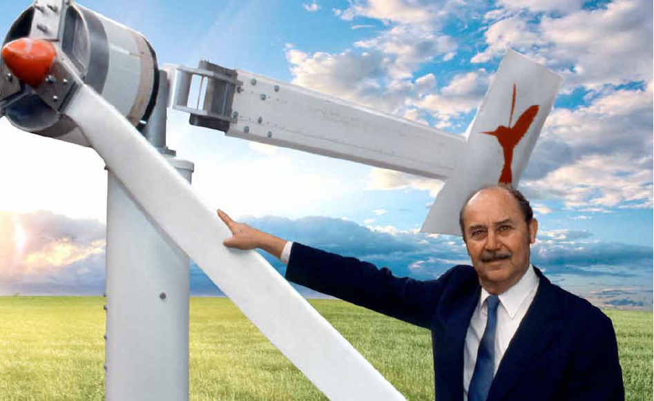 Fuente: Potencia Industrial, S.A. Fecha: 1976 Fuente: Potencia Industrial, S.A. Archivo derivado: 2010